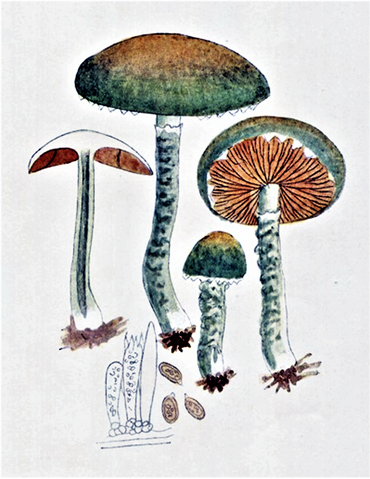 Giacomo Bresadola: Stropharia aeruginosa (Curtis, 1782) Quel. (1872)